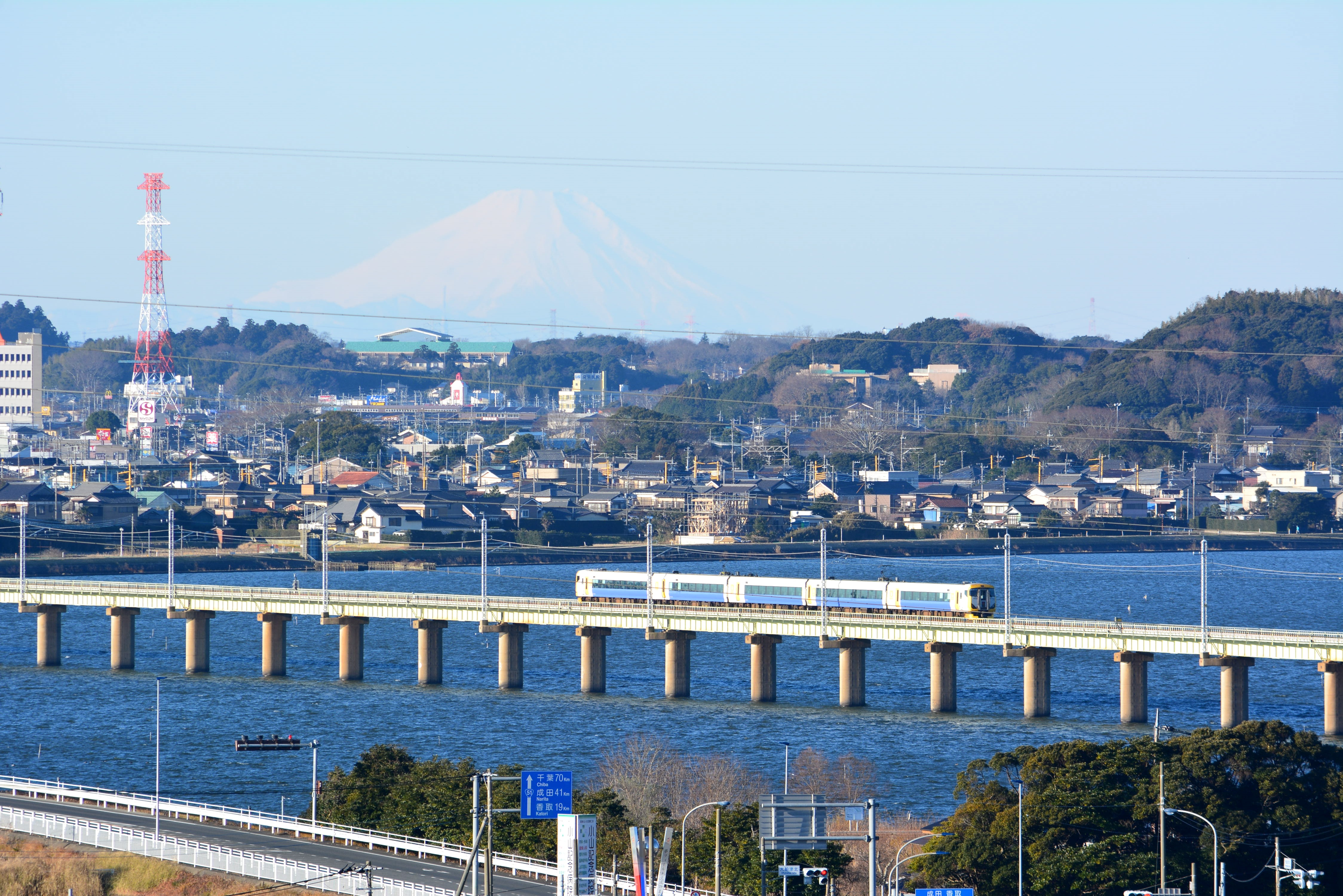 鹿島線を行く特急あやめと富士山。鹿嶋市。